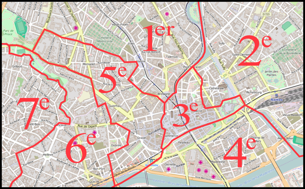 Anciens arrondissements de Nantes, carte du centre-ville. This map may be incomplete, and may contain errors. Don't rely solely on it for navigation.